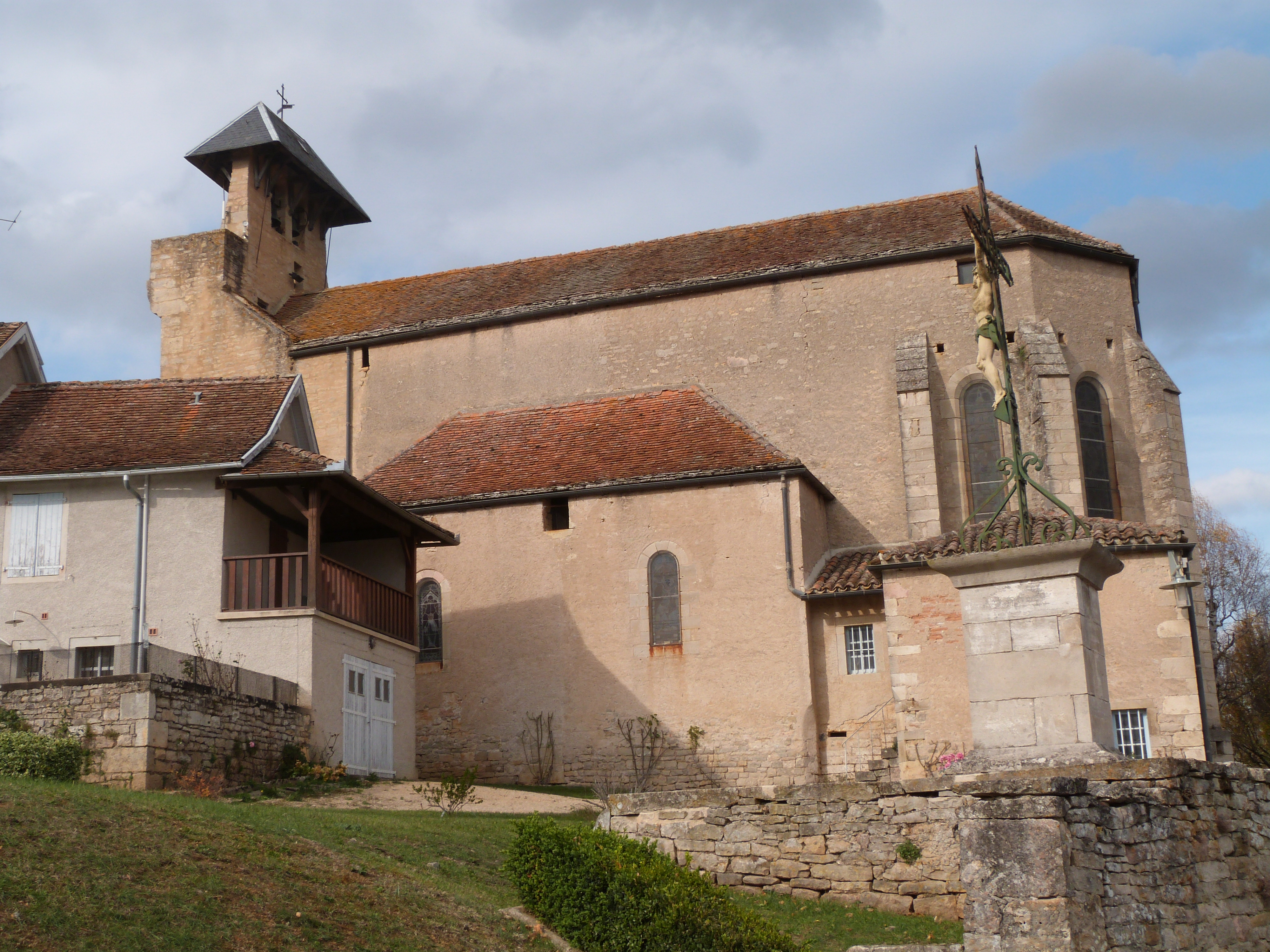 Eglise de Loze